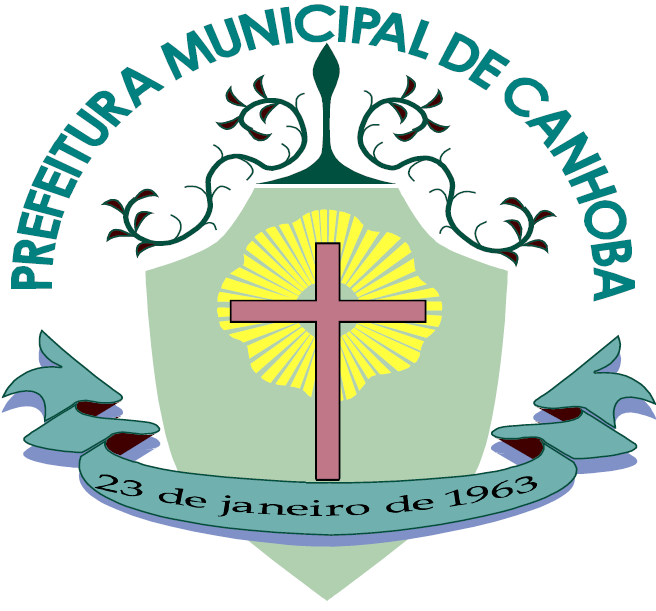 Brasão Municipal de Canhoba, Sergipe